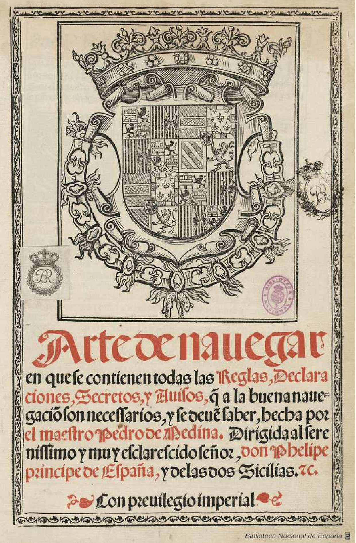 Arte de navegar en que se contienen todas las reglas, declaraciones, secretos y auisos a q la buena navegacio son necessarios, y se deue saber hecha por el maestro Pedro de Medina ... Autor: Medina, Pedro de (1493?-1567?) Fecha: 1545 Datos de edición: Valladolid en casa de Francisco Fernández de Córdoba (Fernández de Córdoba, Francisco (1538-1570).)